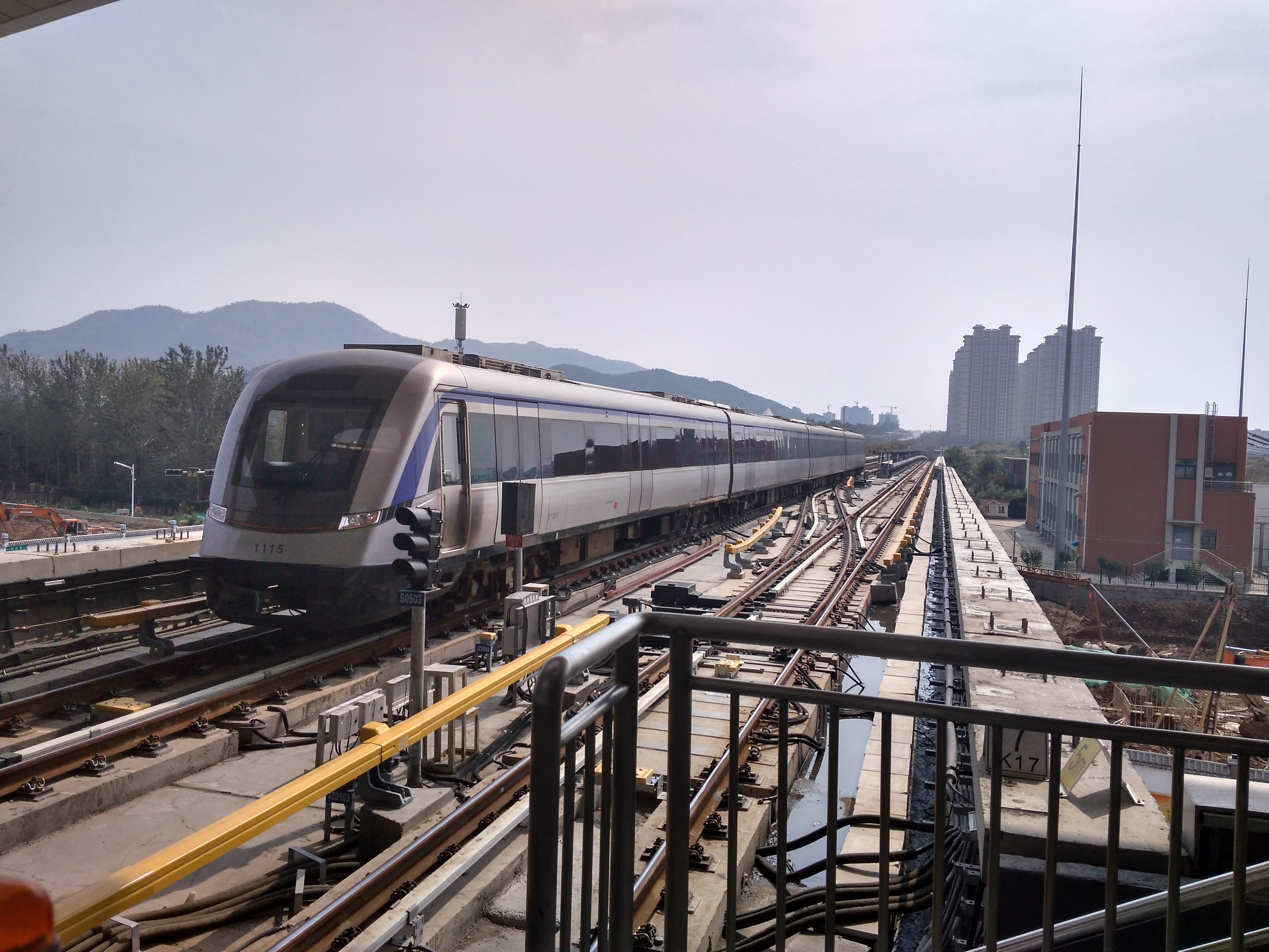 青岛地铁11号线列车正在驶入张村站